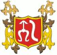 Uroczysty herb Szydłowca